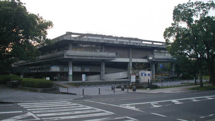 佐賀県立図書館を開館前に撮影。